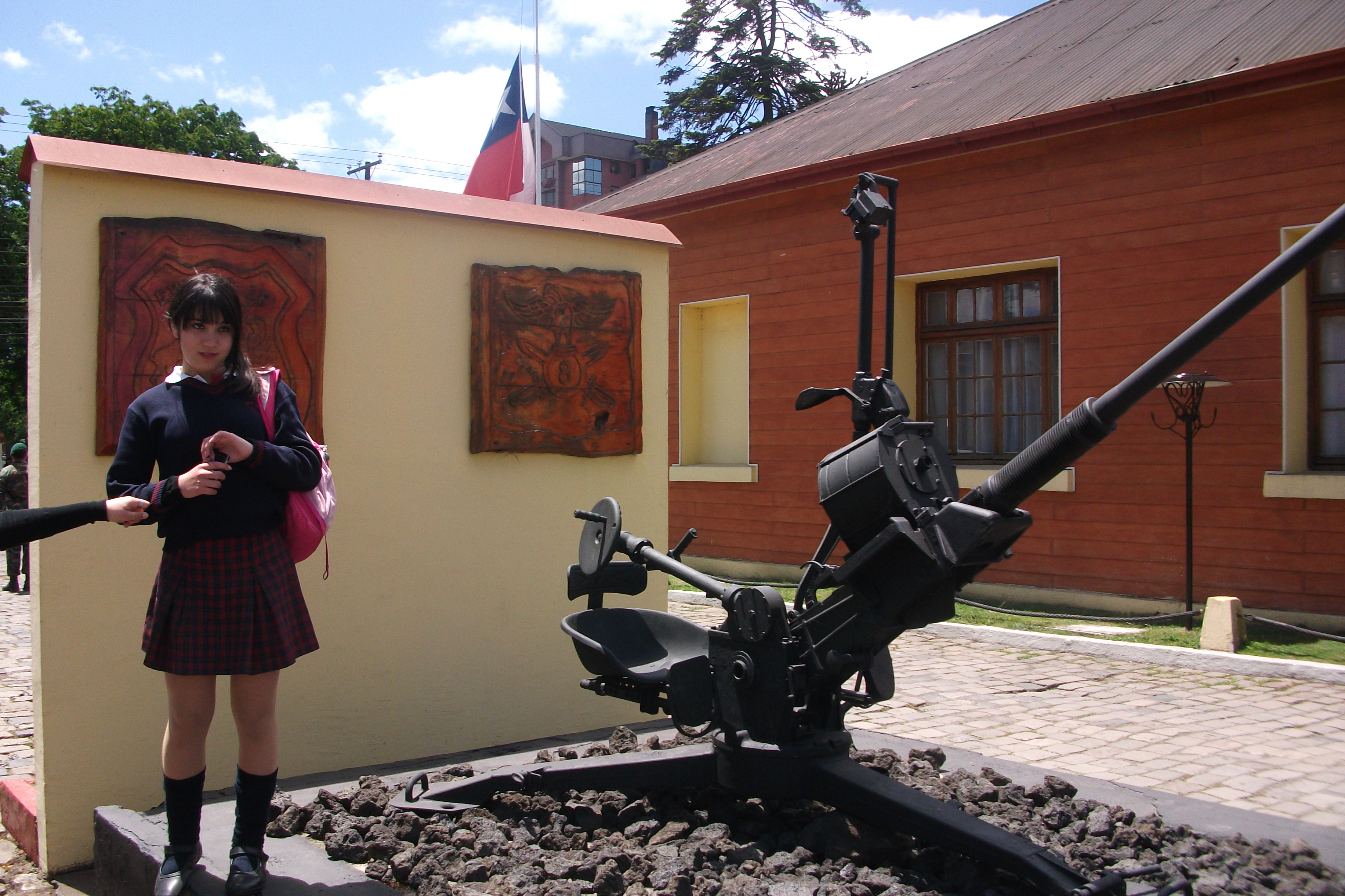 Entrada Regimiento Tucapel De la Ciudad De Temuco, Chile